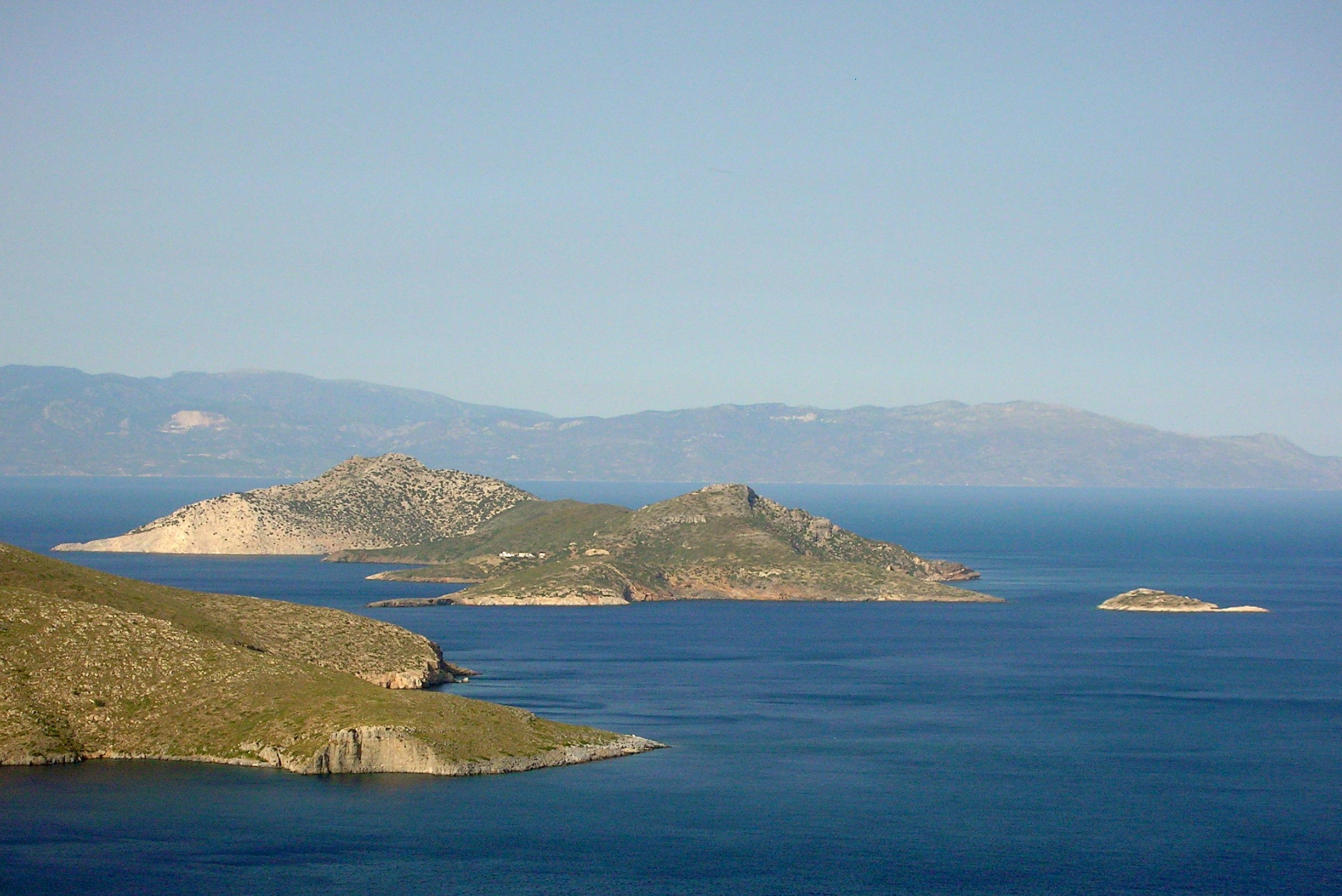 Insel Agios Minas (Fourni), im Hintergrund die Insel Samos